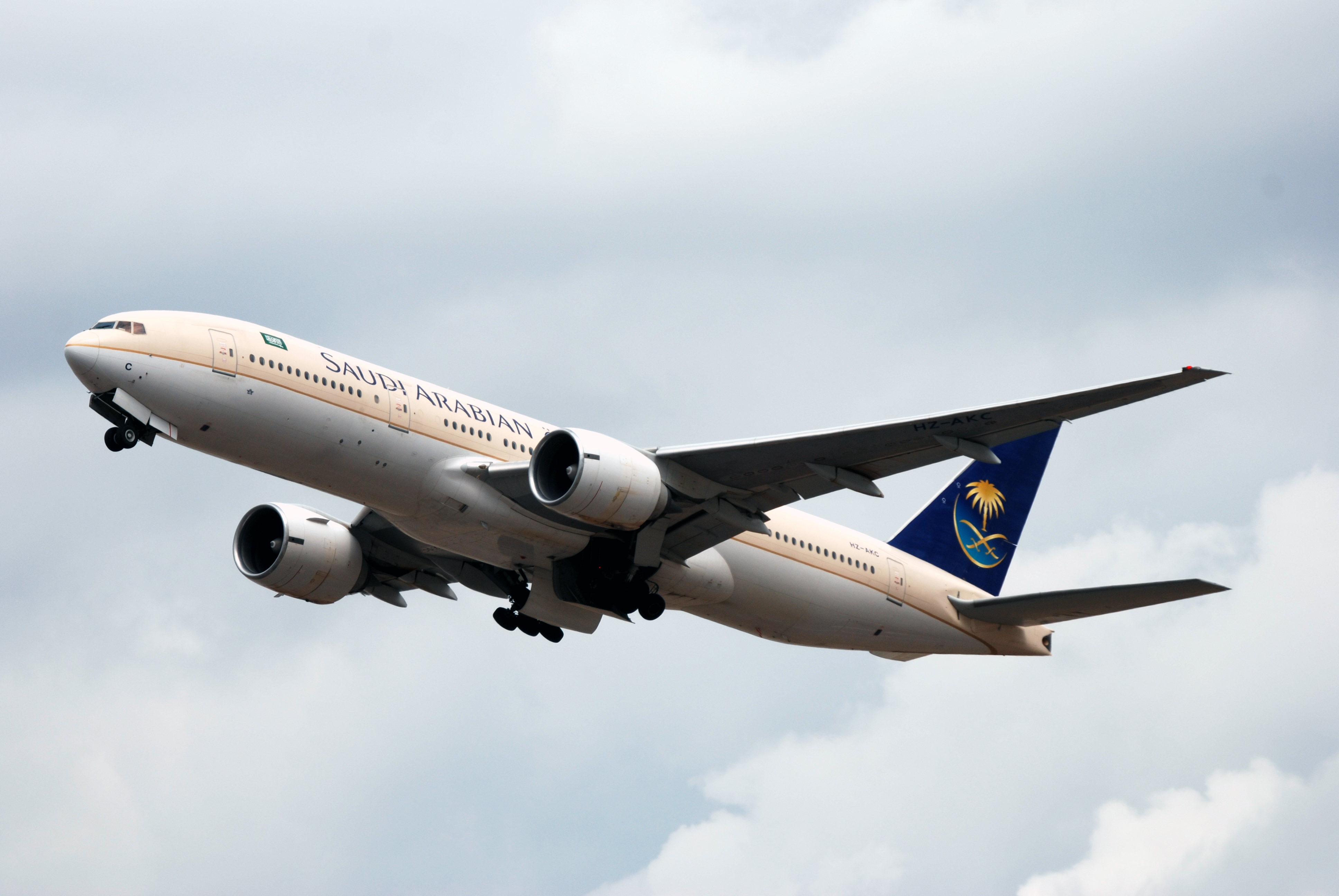 27L departure,July 2010